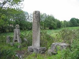 Miliario de Tioira (Maceda)